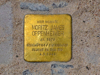 Stolpersteine Schumannstr 15